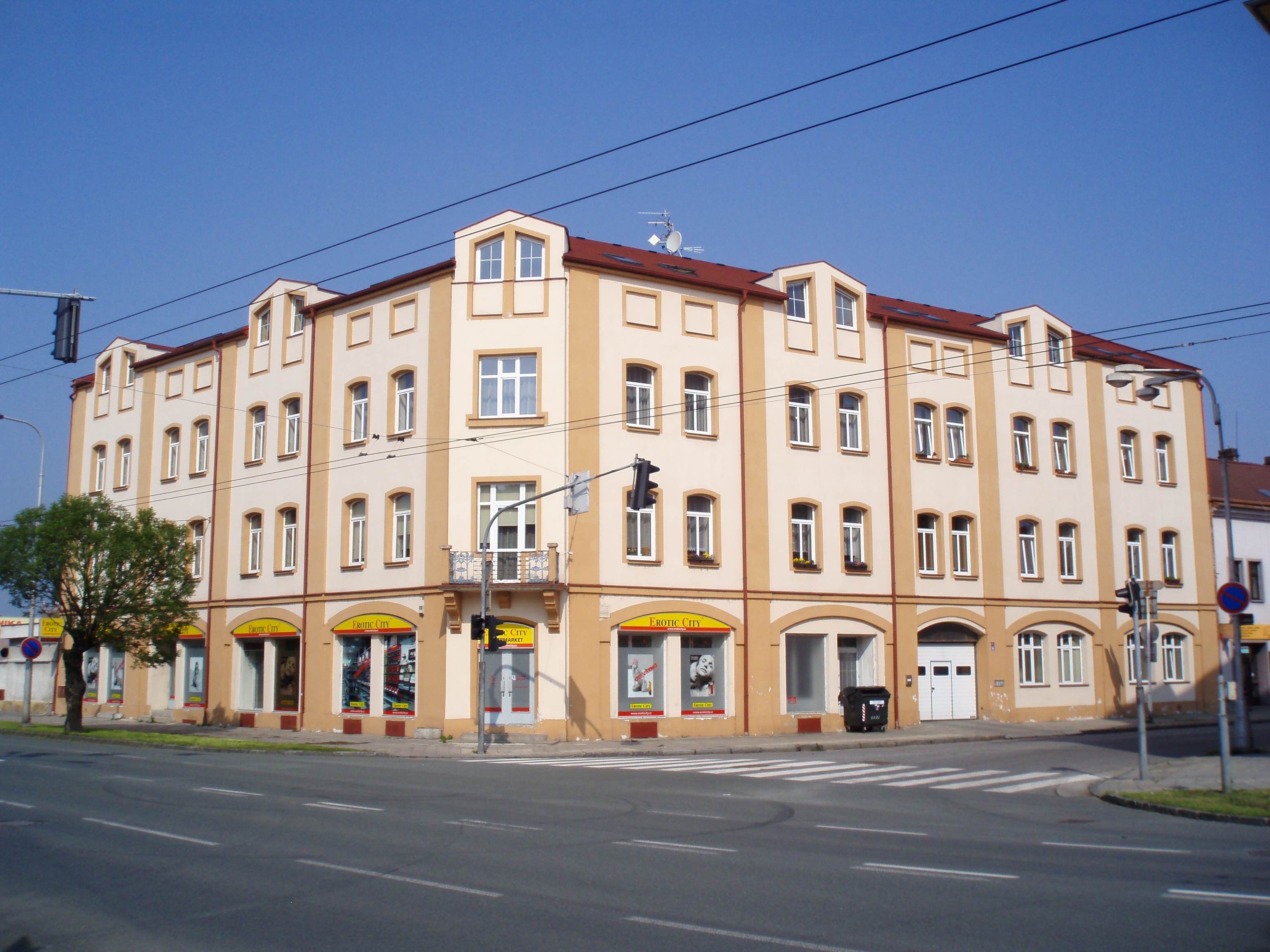 Za Škodovkou čp. 156, dříve bývalý hotel Plakvič